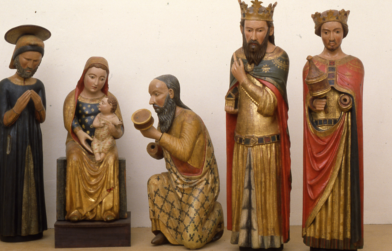 Servizio fotografico : Bologna, 1980 / Paolo Monti. - Foglio: 1, Fotogrammi complessivi: 13/20 : Diapositiva, sviluppo cromogeno/ pellicola ; 35 mm. - ((Sullo chassis della diapositiva n. 8 Monti specifica: "Sculture in legno". - Occasione: Documentazione per la pubblicazione di: "Rappresentazione dei Magi: il gruppo ligneo di S. Stefano e Simone dei Crocefissi, catalogo della mostra, Bologna 1981-1982, a cura di Massimo Ferretti, Bologna, Edizioni Alfa, 1981. - Fonte: Agenda di Paolo Monti: Nikon Leika 3001-/ Monti 1978 (1978-1982), presso Archivio Paolo Monti. - Fonte: Fattura di Paolo Monti: IV. Commesse/ Fattura n. 24/ Sculture in legno dipinto - Restauro Prof. Caprara (1980/10/01), presso Archivio Paolo Monti. N. 67 riprese eseguite presso lo studio del Prof. Caprara - consegnate 134 foto 18x24. - Fonte: Monografia: Rappresentazione dei Magi: il gruppo ligneo di S. Stefano e Simone dei Crocefissi, catalogo della mostra, Bologna 1981-1982, a cura di Massimo Ferretti, Bologna, Edizioni Alfa (1981). - Fonte: Agenda di Paolo Monti: Diapositive 24x36mm (1948-1982), presso Archivio Paolo Monti